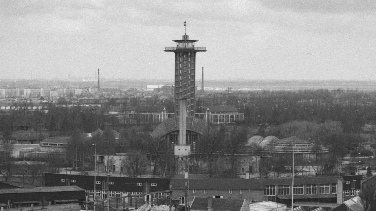 Opening Diergaardetunnel in Rotterdam